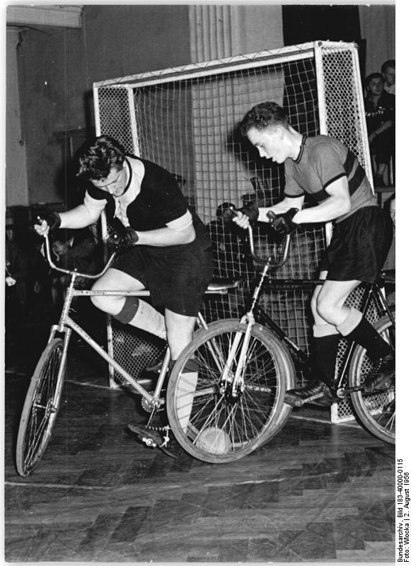 Wlo-Krz. In Leipzig begannen die Sportveranstaltungen. Am Donnerstag, den 2.8.1956, fand in der HO-Gaststätte Elstertal in Leipzig ein Radball-Jugendturnier statt. Es gewann die Mannschaft von Motor Liebenstein vor Post Erfurt und Lokomotive Erfurt auf Grund ihres besseren Torverhältnisses. UBz: Im letzten Spiel des Turnieres standen sich Motor Bad Leibenstein und Post Erfrut gegenüber. Post Erfurt gewann 3:1. Vor dem Tor im Zweikampf Klaus Langlotz (Motor Leibenstein) und Dieter Stölze (Post Erfurt).